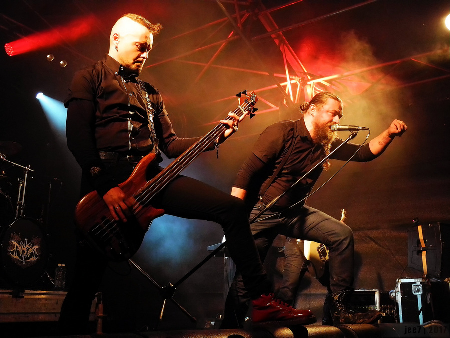 Ansambel Loits tegemas oma viimast kontserdit muusikafestivalil Hard Rock Laager 2017. Pidlil basskitarrist M. Divine ja laulja Ahto-Lembit Lehtmets.